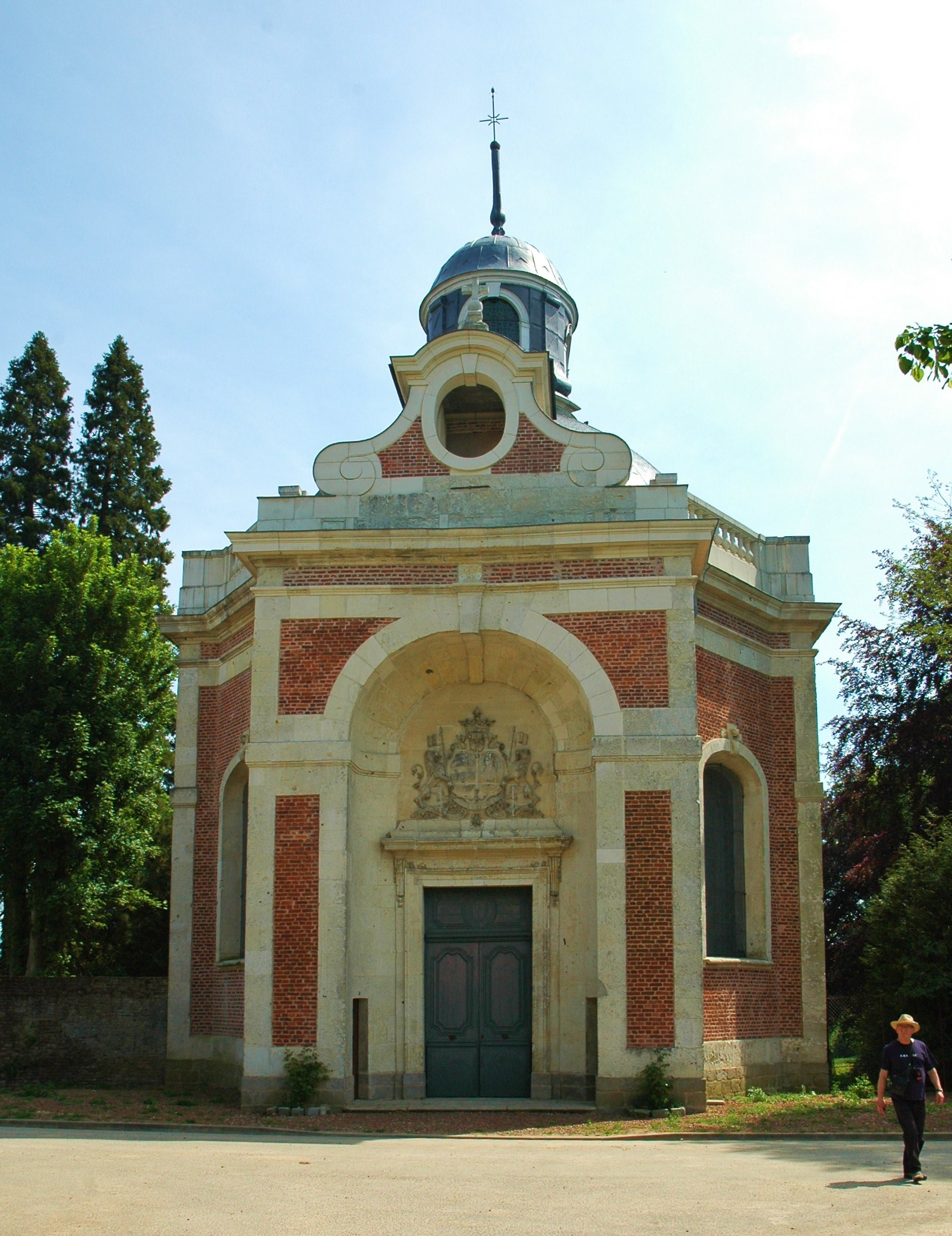 Mailly-Maillet (Somme, France). La chapelle sépulcrale.